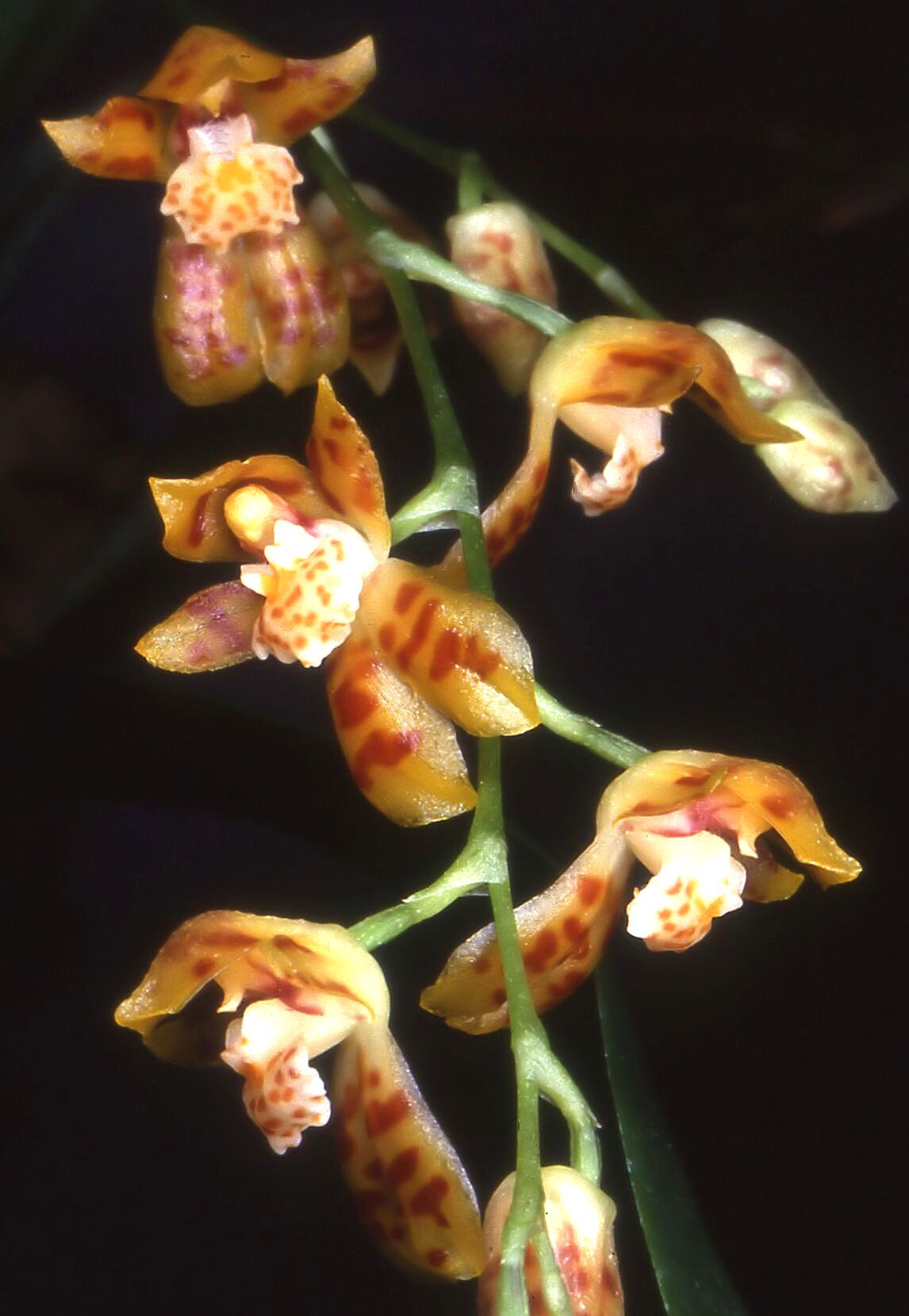 Mesospinidium incantans